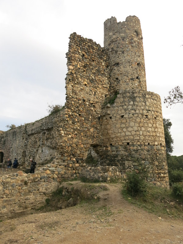 Castell de Sant Iscle a Vidreres - la Selva - Catalunya